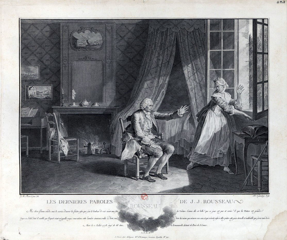 Gravure d'Henrich Guttenberg d'apr. Moreau